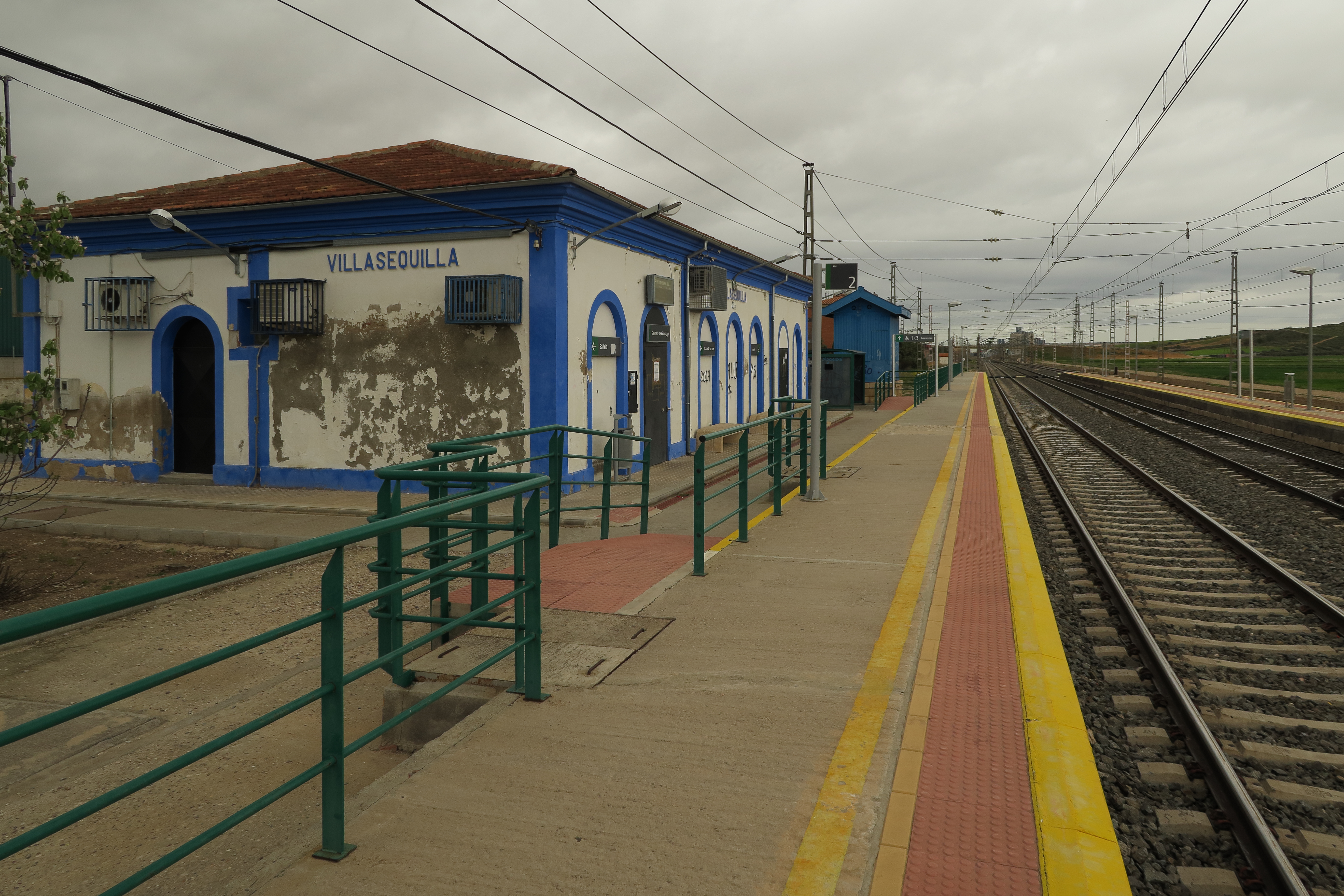 Estación de Villasequilla